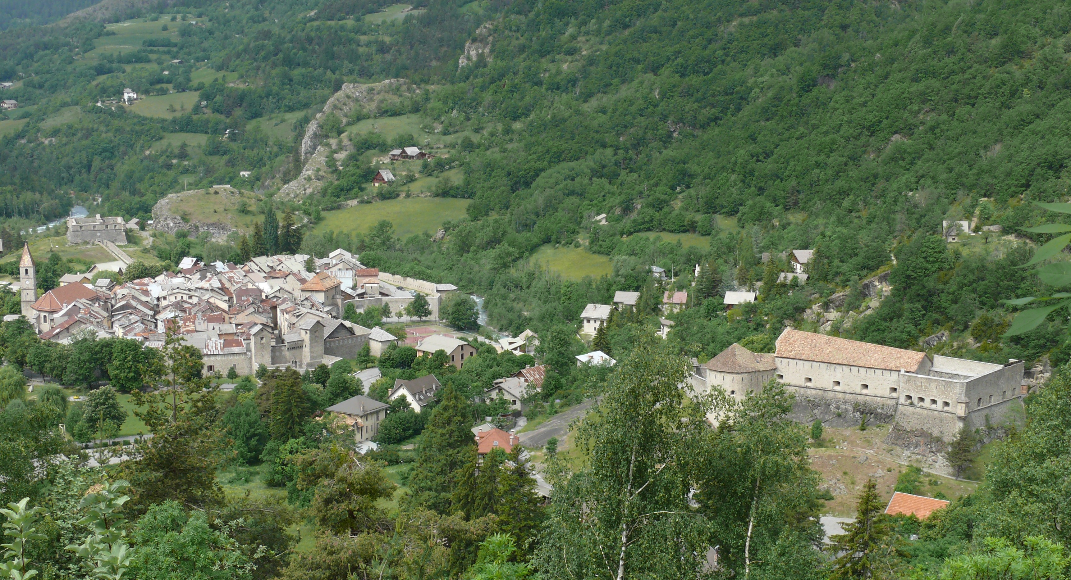 Colmars - Vue d'ensemble du village et des forts de Savoie et de France